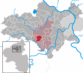 Mertloch in Rhineland-Palatinate - district Mayen-Koblenz